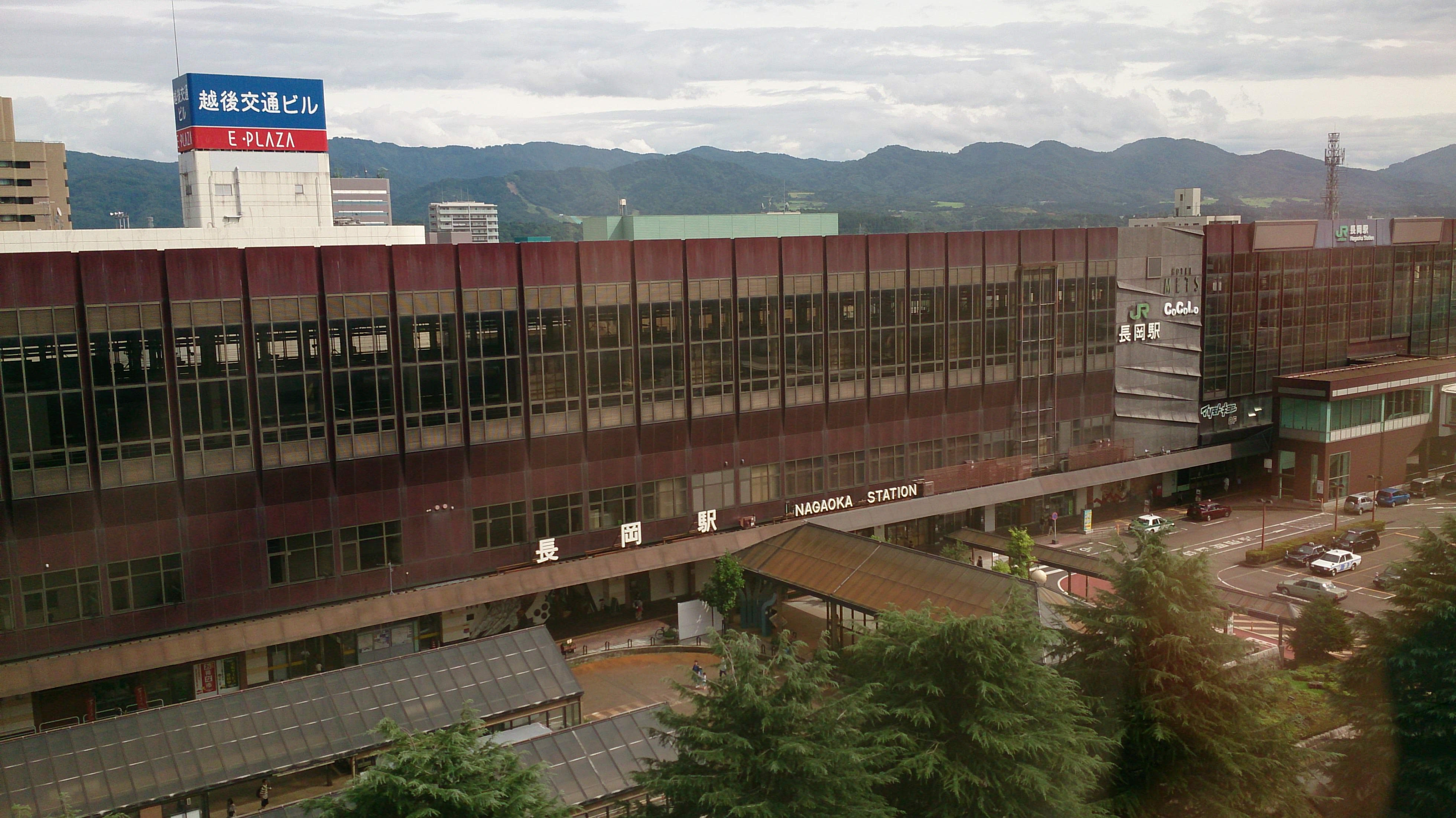 長岡駅舎（大手口）全景・イトーヨーカドー丸大長岡店7Fより撮影